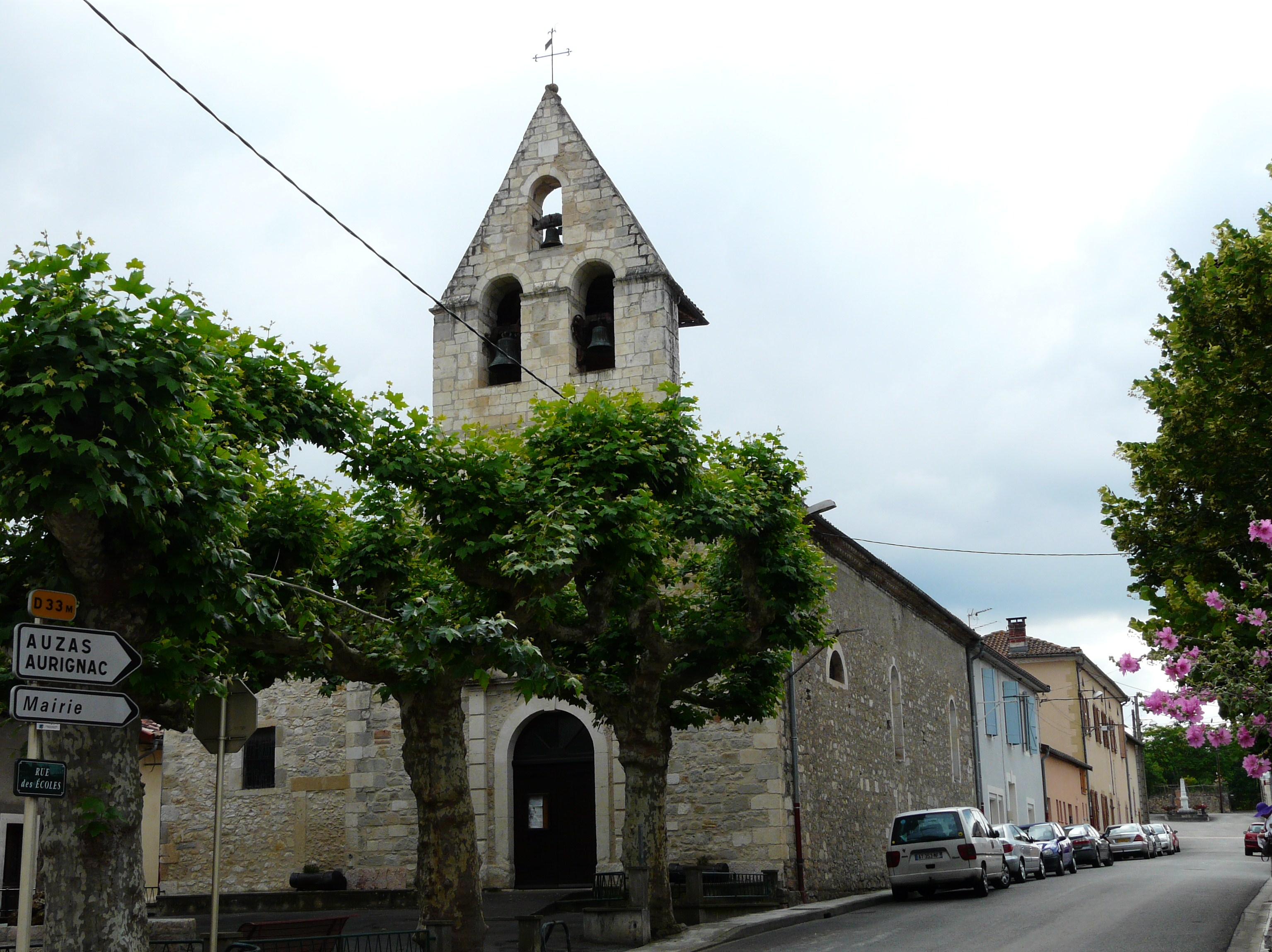 L'église de Mancioux, Haute-Garonne, France.